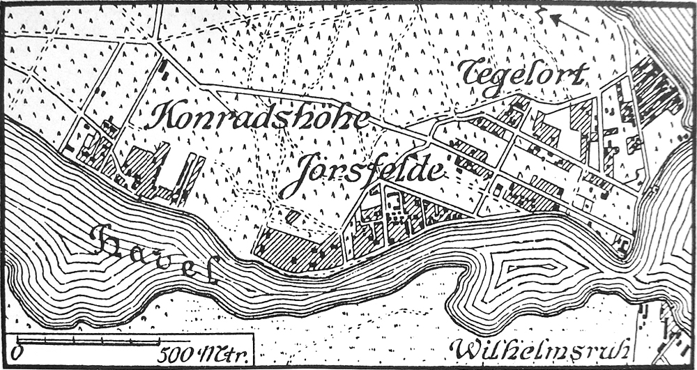 Regierungsbezirk Potsdam Blatt 1, Oberförsterei Tegel, Maßstab 1:12000